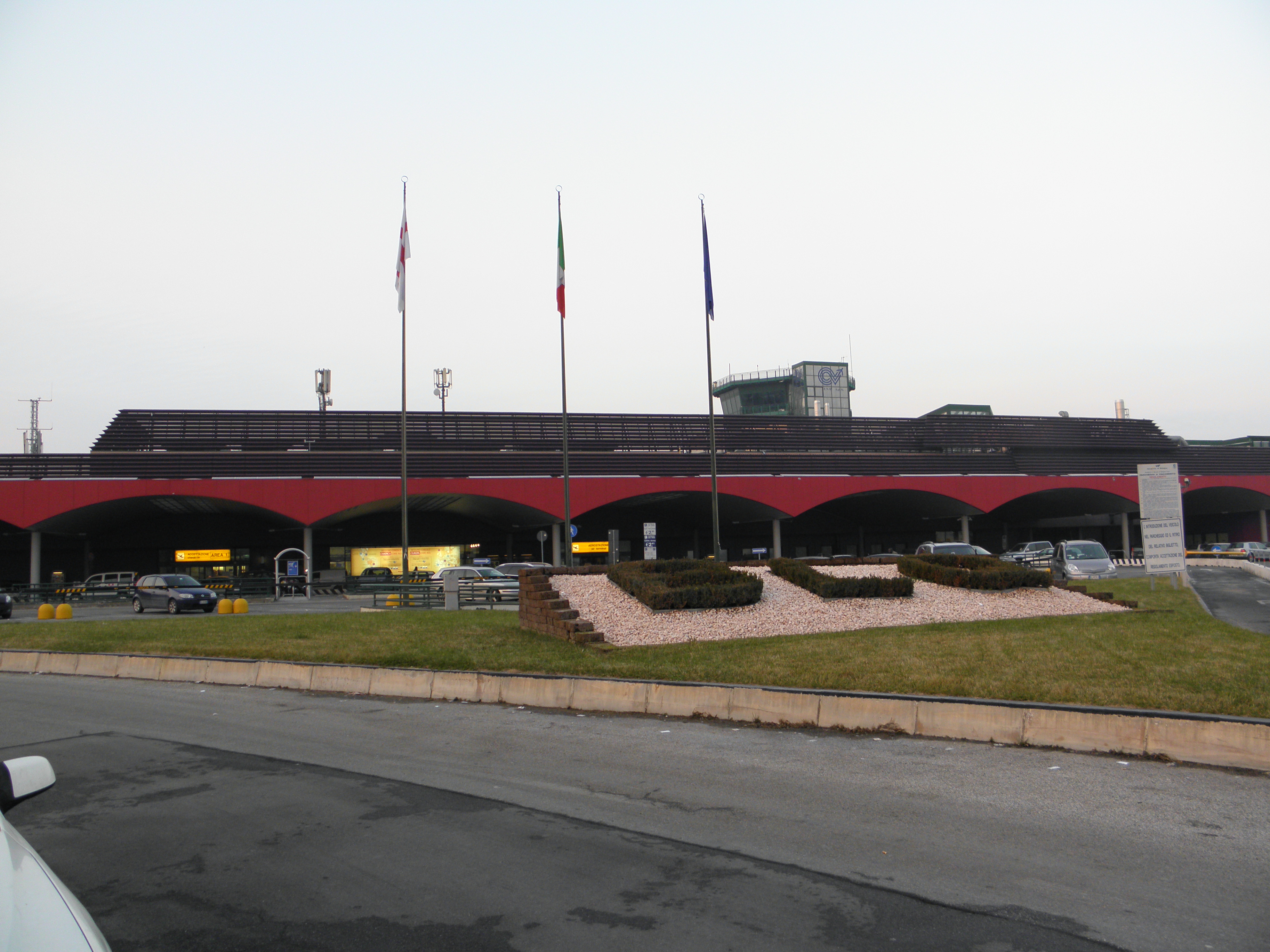 Il piano superiore del terminal dell'aeroporto "Guglielmo Marconi" di Bologna-Borgo Panigale.